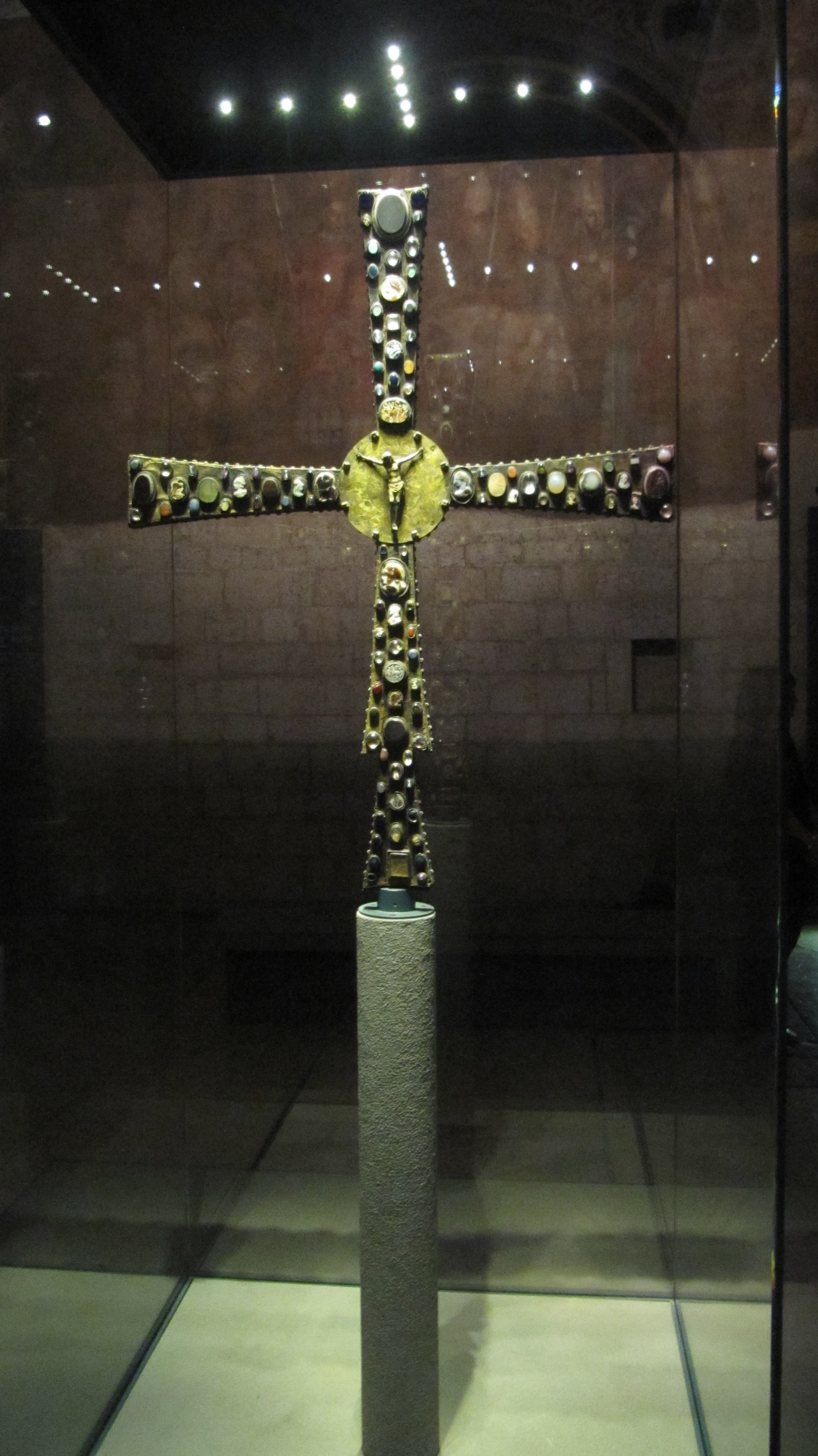 Croce di Desiderio, IX secolo, museo di Santa Giulia, Brescia